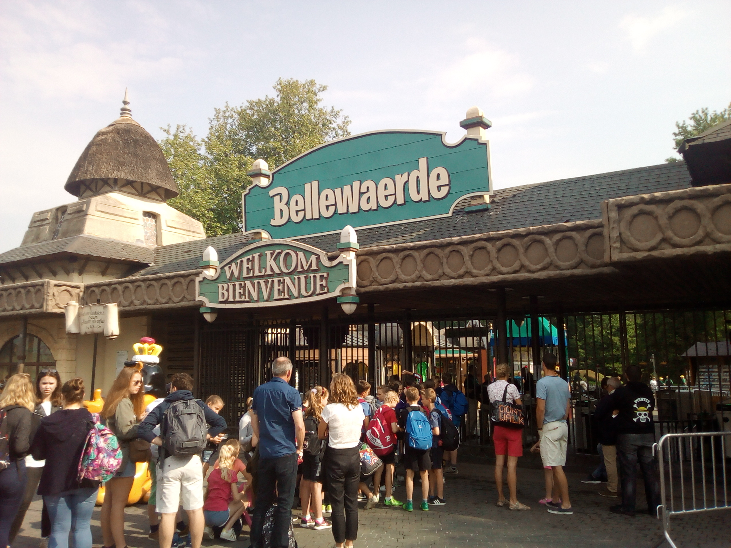 Ingang Bellewaerde